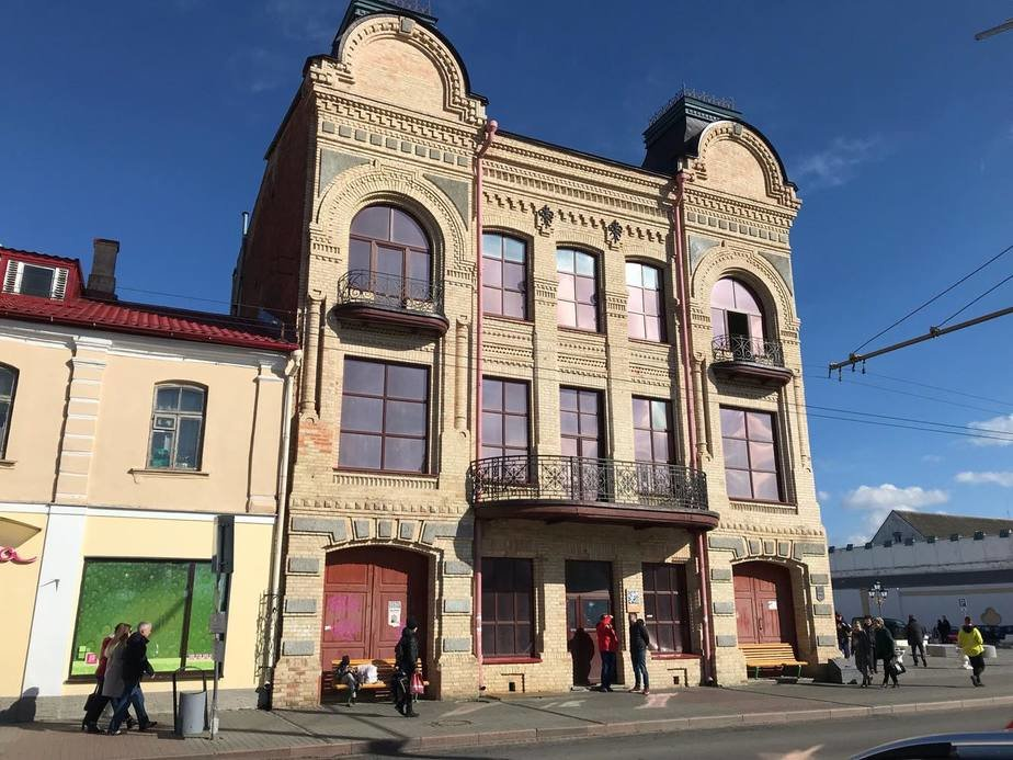 Дом купца Мураўёва на цэнтральнай плошчы Гродна